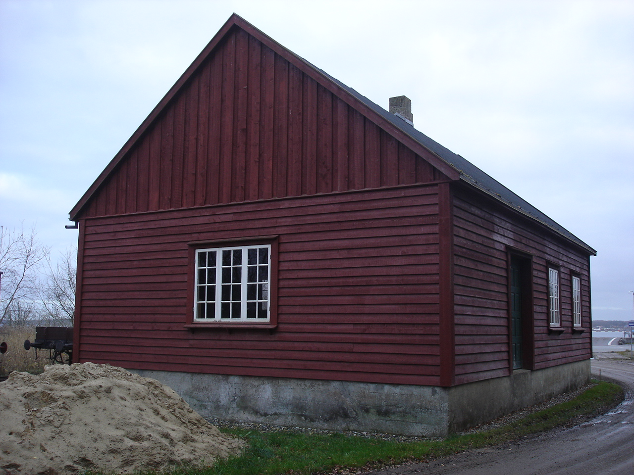 Sundsøre Pakhus fra vejsiden